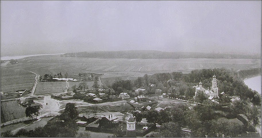 Вид с колокольни Симонова монастыря, на горизонте Тюфелева роща.